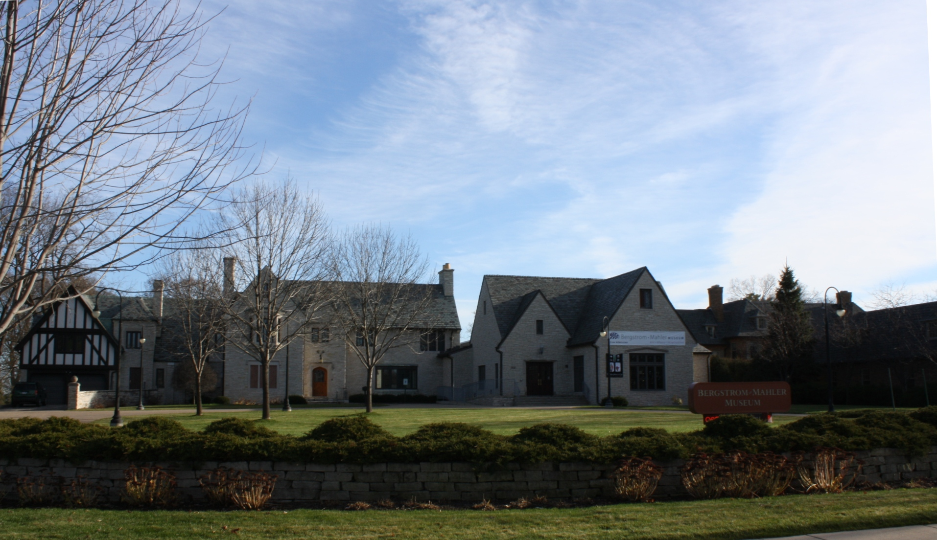 The Bergstrom Mahler Museum in Neenah, Wisconsin.